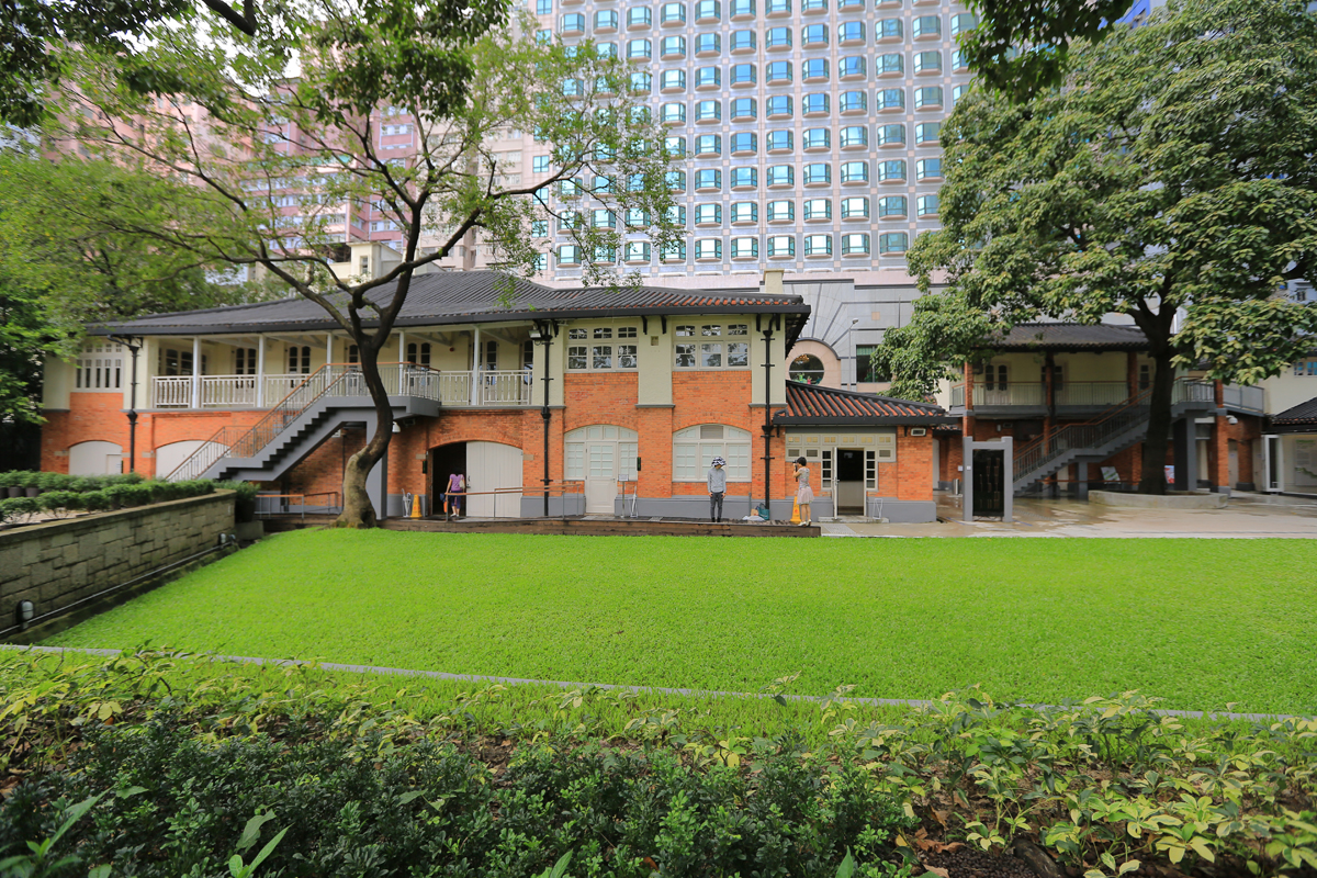 是香港其中一間歷史最悠久的俱樂部